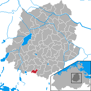 Bredenfelde, Landkreis Demmin, Mecklenburg-Vorpommern